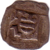 Böser Halser, Schinderling um 1460